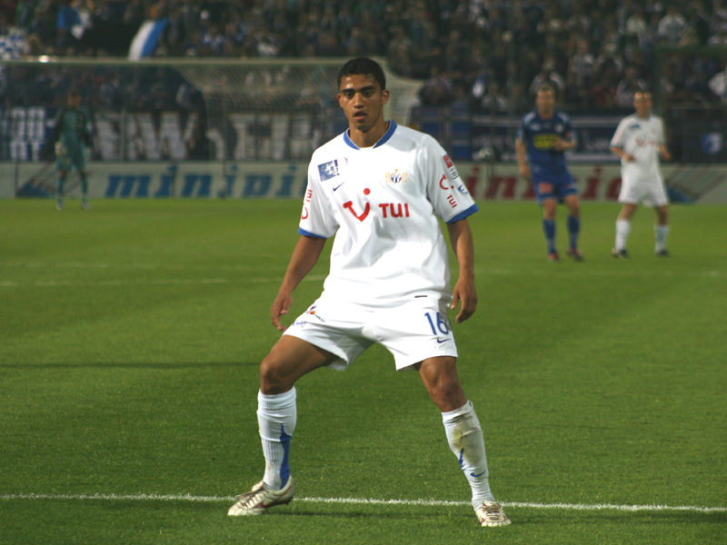 Eudis, FCZ, Hardturm Stadion (Schweiz), Pokal Halbfinale, FC Zürich - FC Luzern 2:3